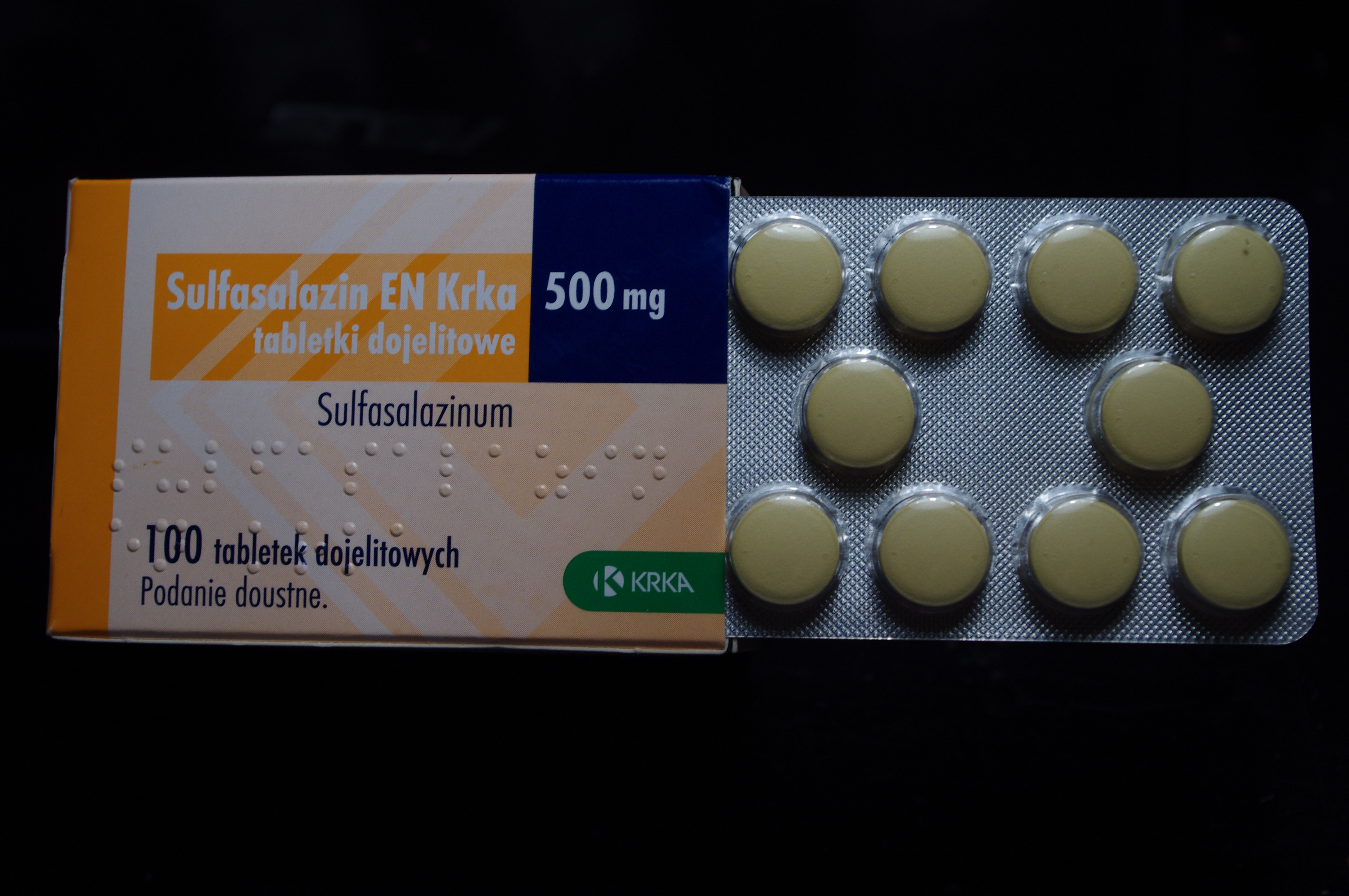 Sulfasalazyna, tu: "Sulfasalazin EN Krka". Dawka 500mg, 100 tabletek. Na zdjęciu opakowanie oraz blister.